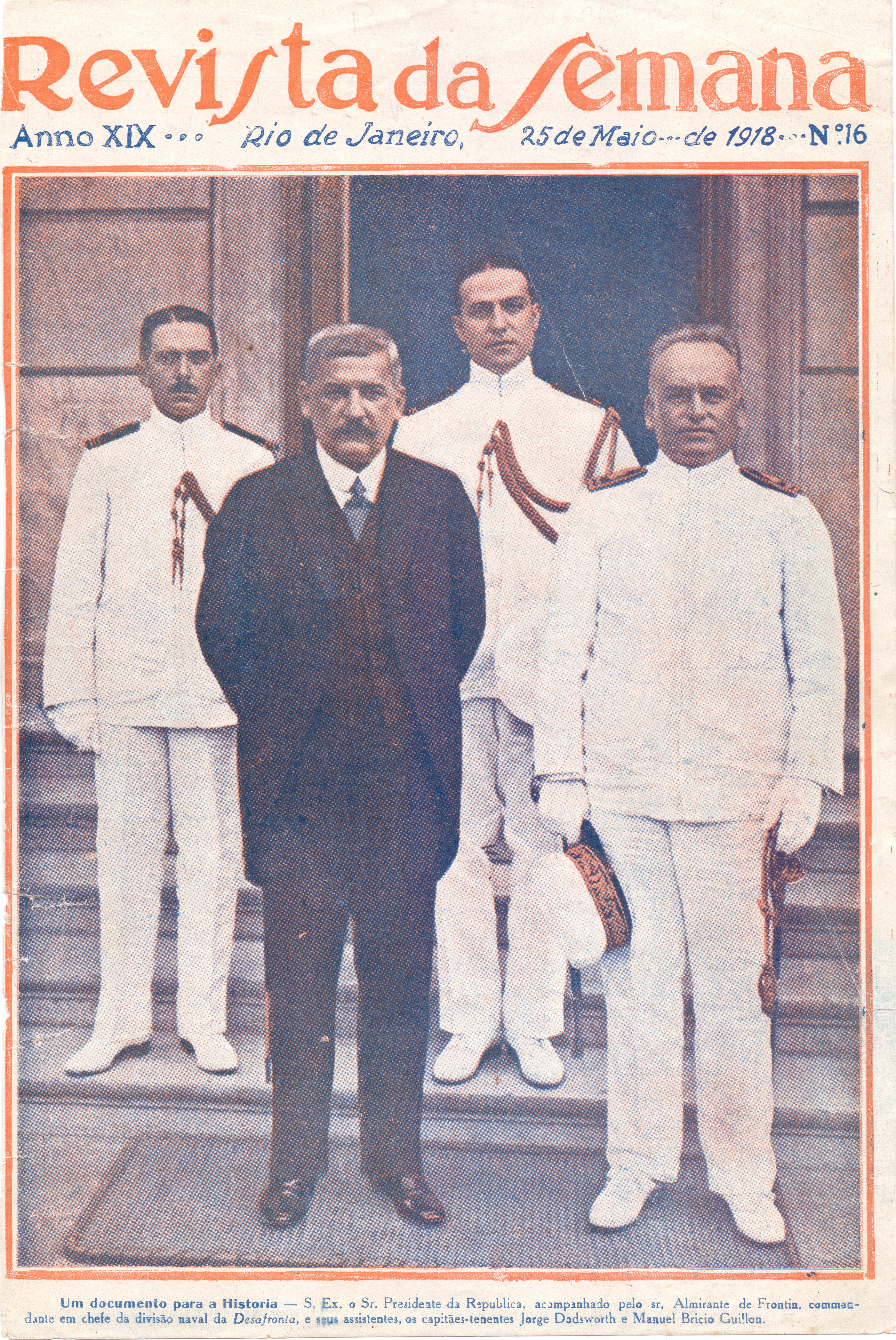 O Almirante Frontin em visita de despedida ao Presidente da República Wenceslau Braz, na véspera da partida da Divisão. Da esquerda para a direita: Capitão-Tenente Guilhon, então 1º assistente, Presidente Dr. Wenceslau Braz, Capitão-Tenente Dodosworth Martins, 2º assistente e o Almirante Frontin. Arquivo liberado pela Marinha do Brasil através de projeto GLAM com Wiki Educação Brasil